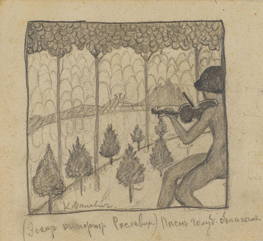 Portrait of the Composer Roslavets